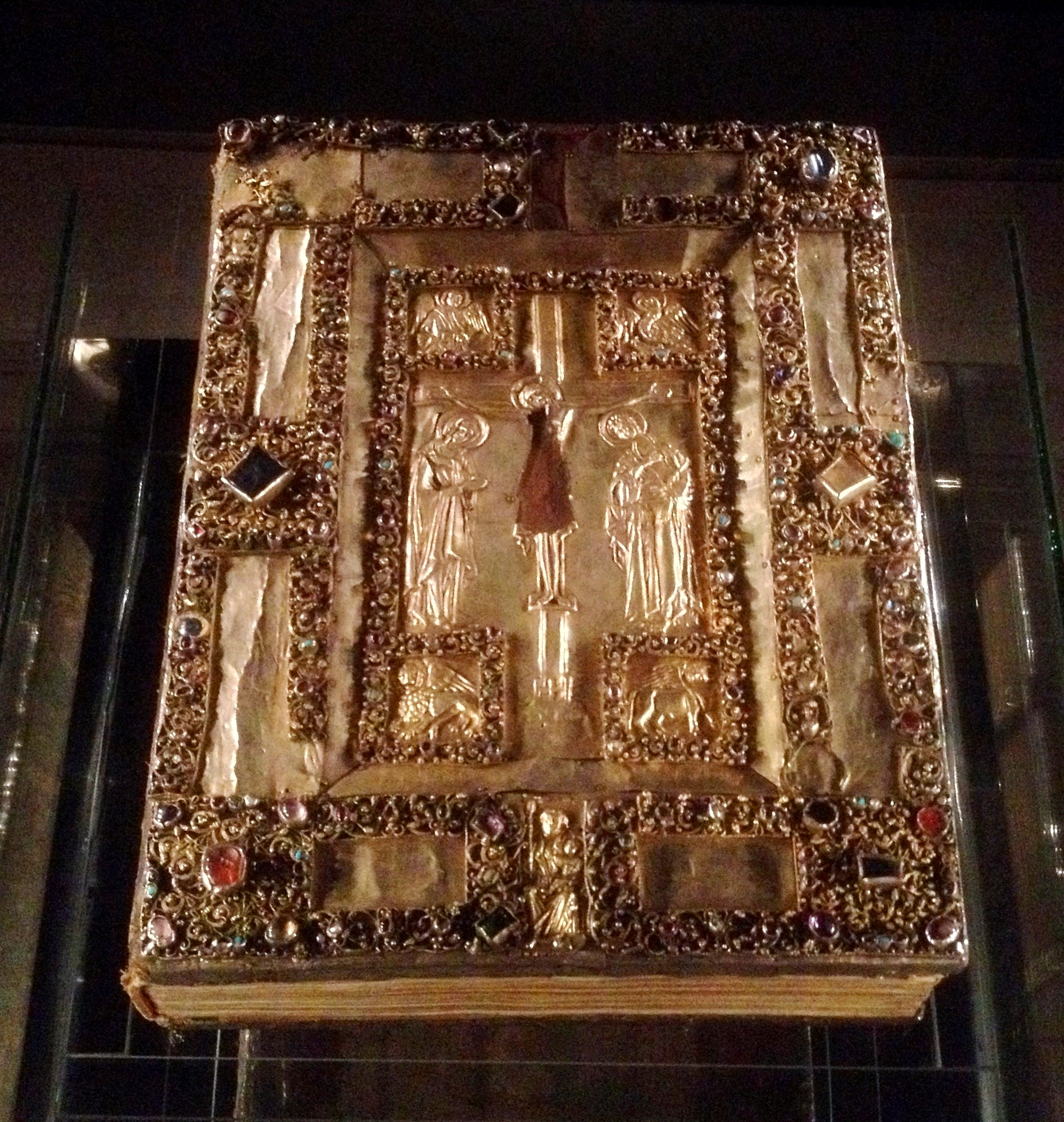 Goslarer Evangeliar, Einbanddeckel